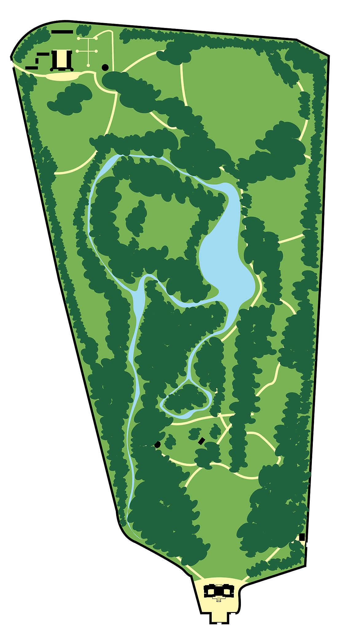 Disegno tecnico del Castello di Racconigi